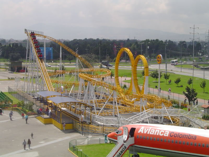 Toma lejana de la atraccion. Avion de Avianca al fondo.